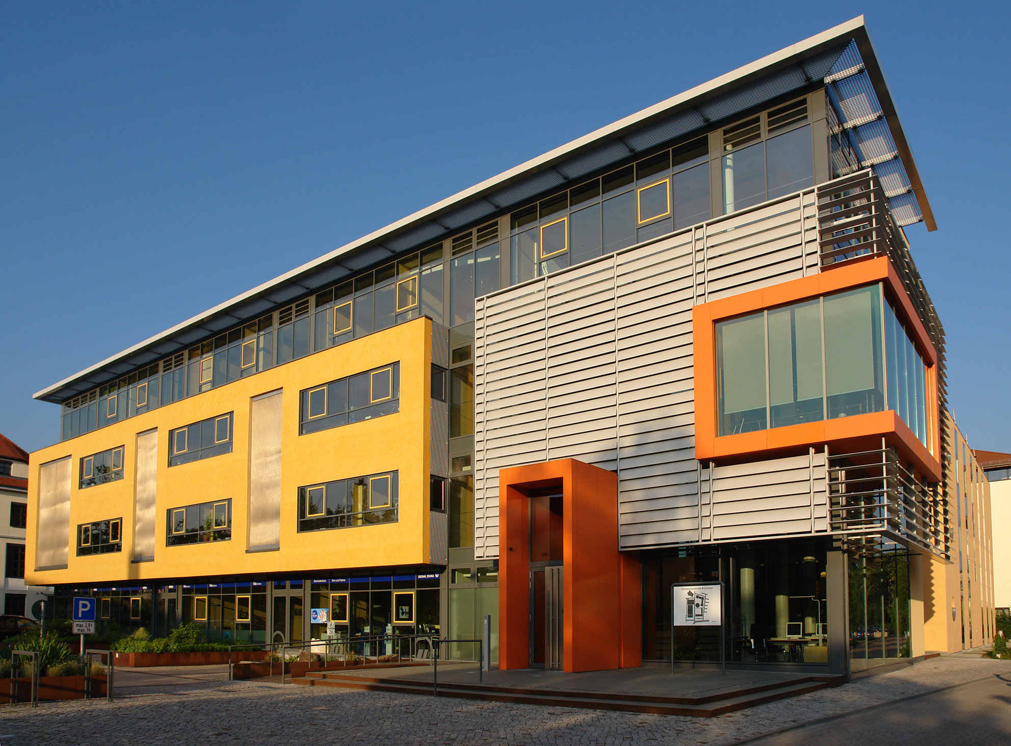 Handwerkskammer Dresden